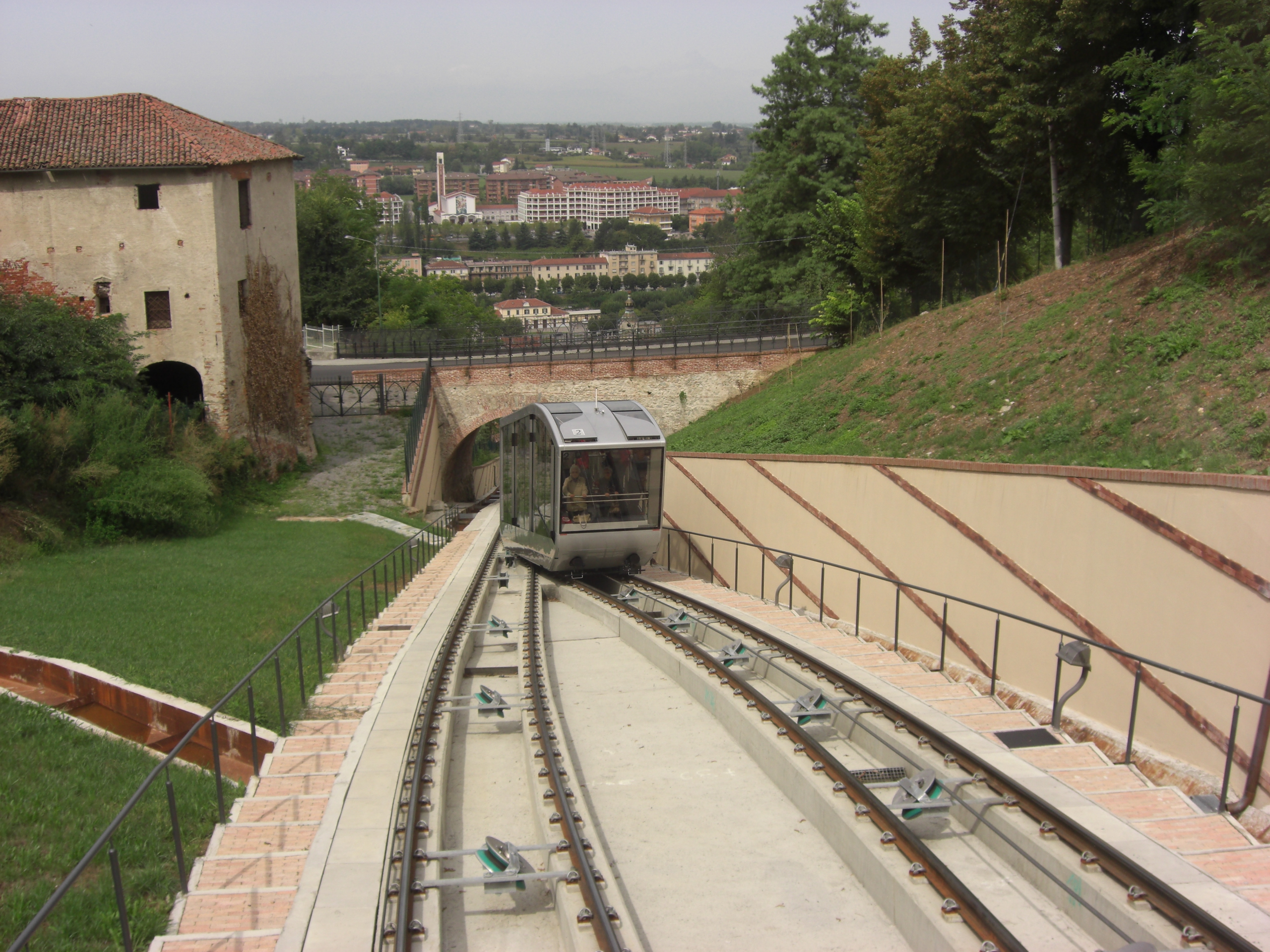 Mondovì - Scambio dei binari lungo il percorso della funicolare